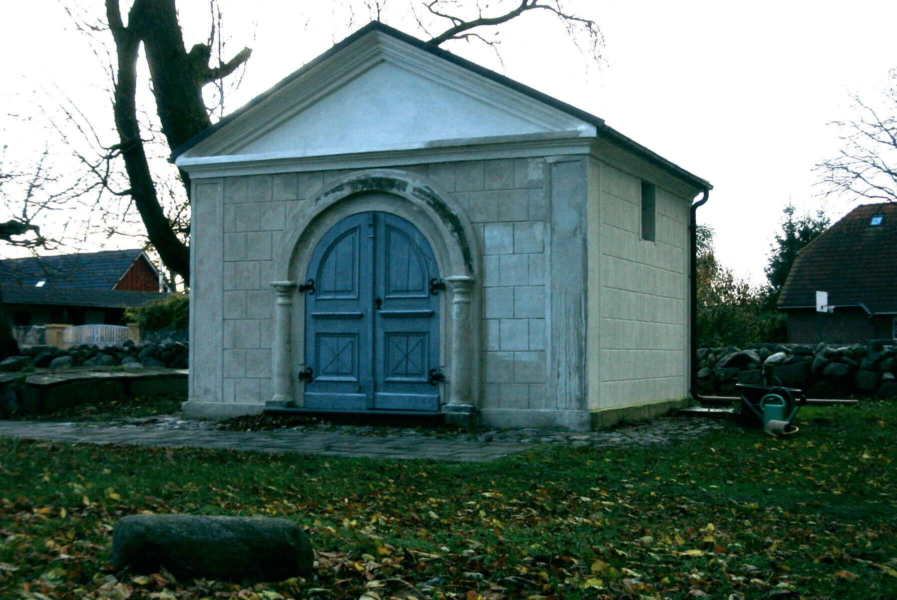 Friedhofskapelle Wrangelsburg